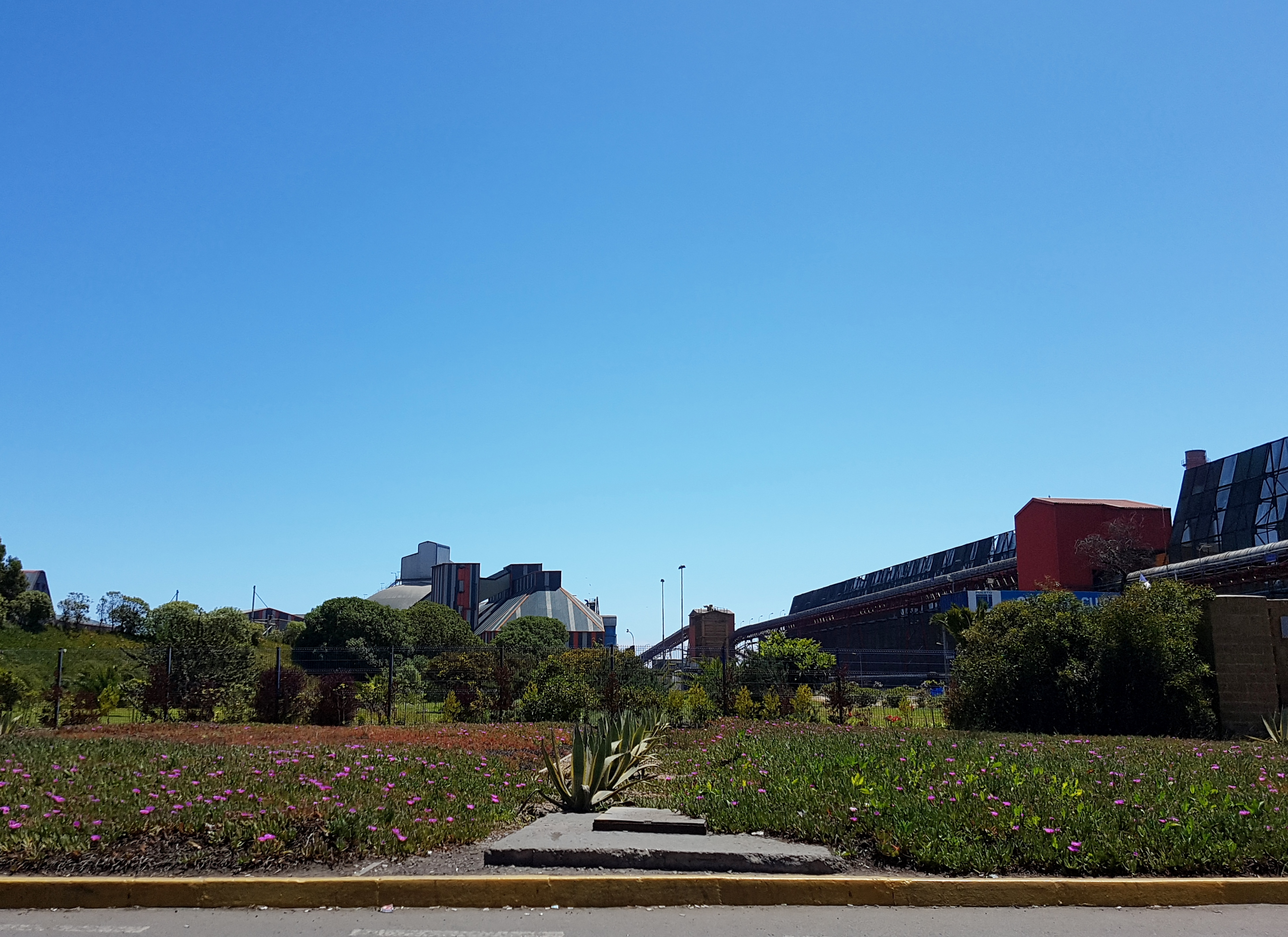 La Ventanas, Codelco, región de Valparaíso, Chile.